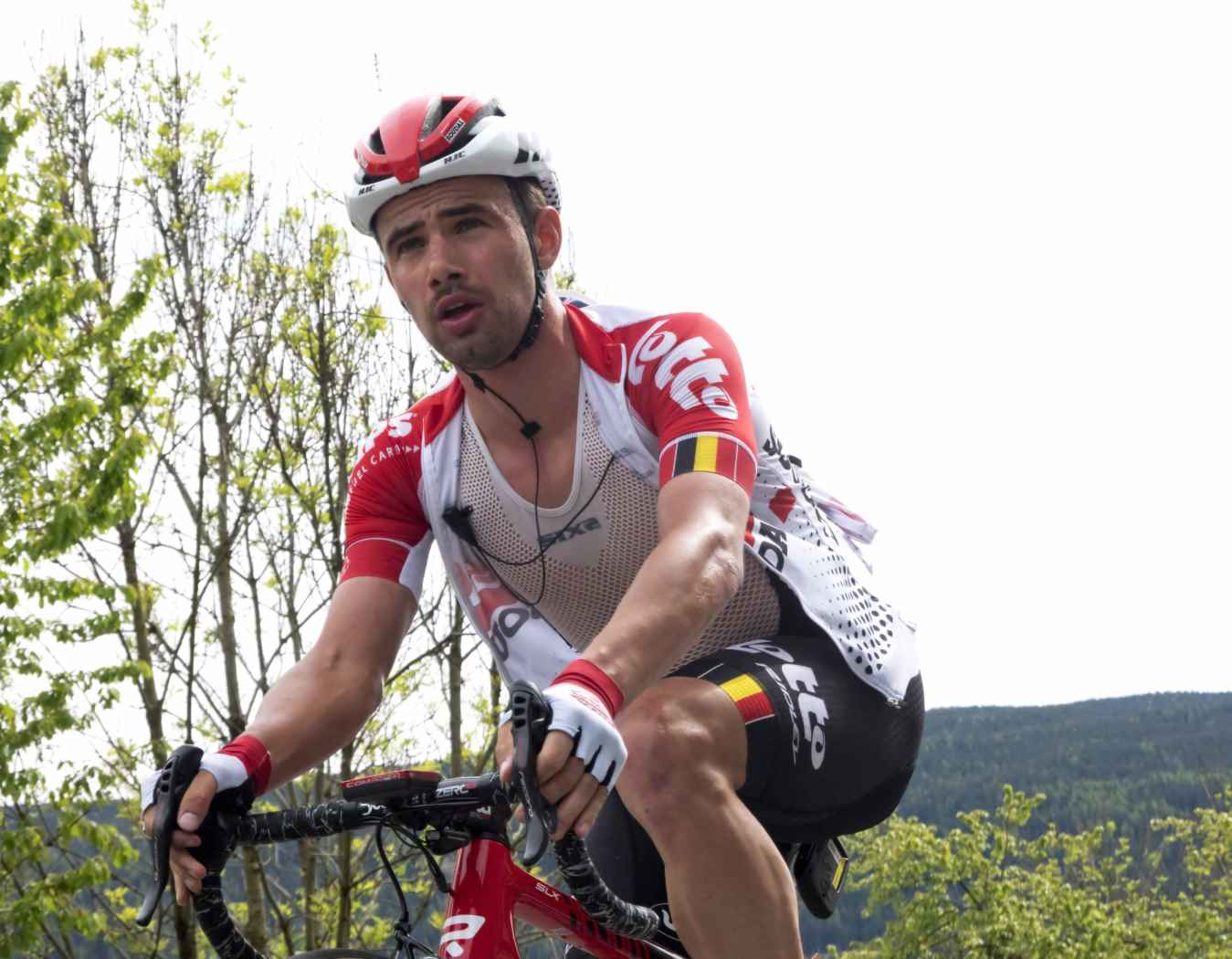 DSC02955 giro2019 campenaerts